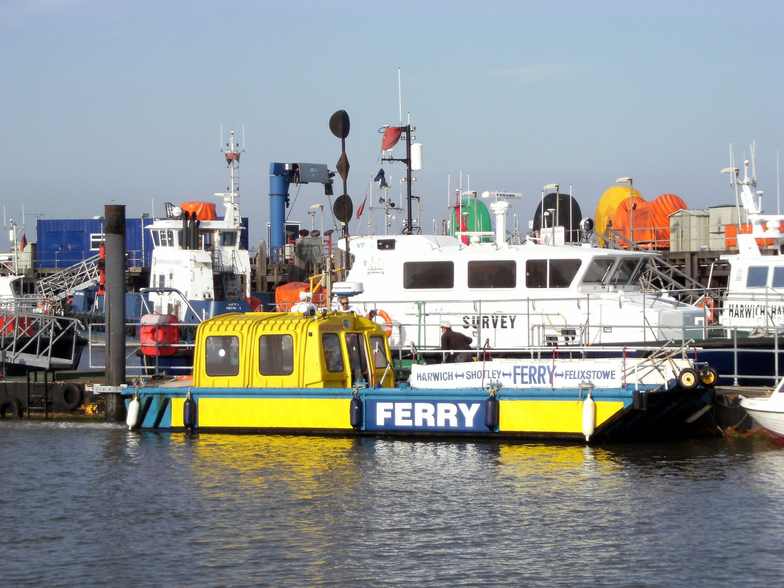 Harwich Ferry